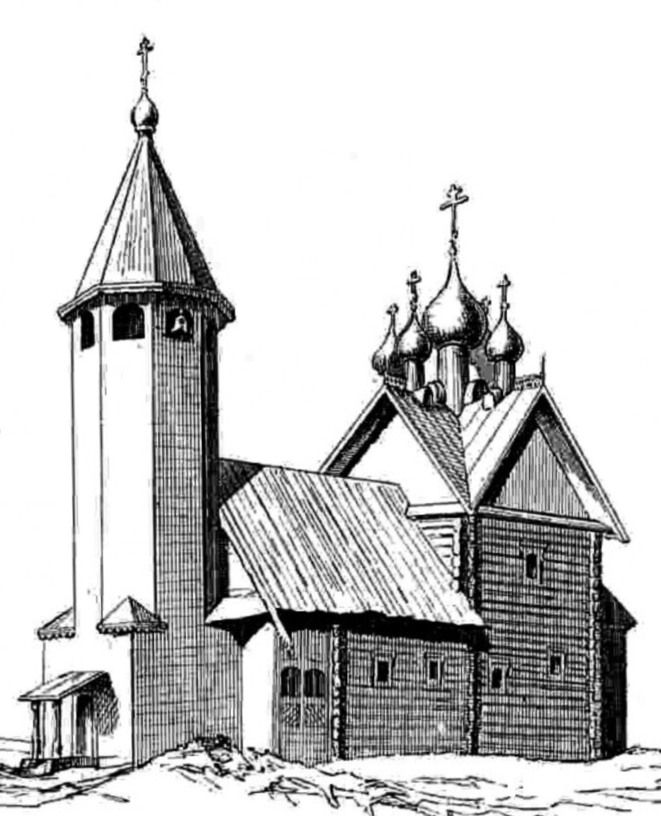 Церковь Воскресения Христова (нач. XVII в.) в Неклюдове (ныне г. Бор). Рис. из журнала "Зодчий"